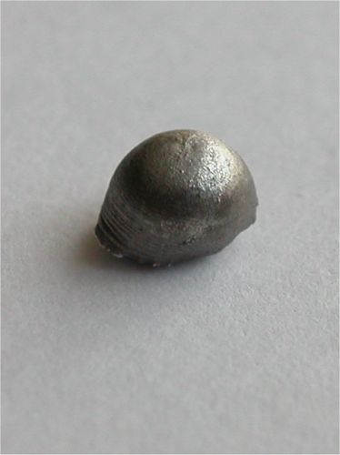 Bildbeschreibung: Iridium-Schmelzperle Quelle: Foto aus meiner Elementesammlung Fotograf: Tomihahndorf Datum: April 2006